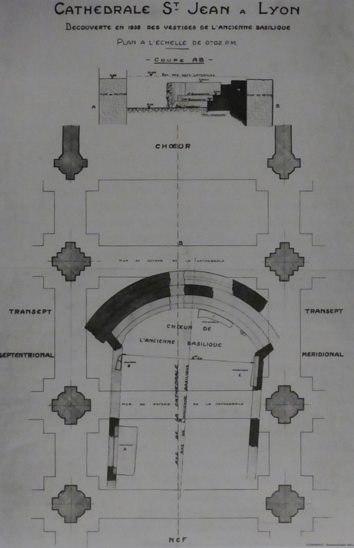 Plan, dressé en 1936 par l'architecte Gabriel Mortamet, représentant le chœur de la primatiale Saint-Jean de Lyon, surimposé au plan de l'ancienne basilique (détruite à partir de 1175) dont les fondations sont retrouvées lors des travaux de 1936.